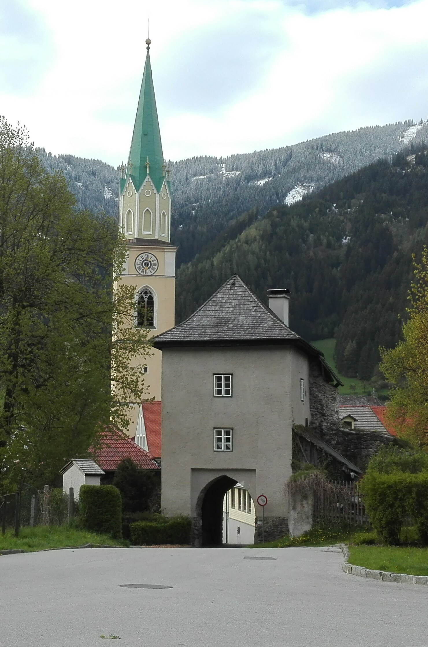 Blick auf die Kirche und das Burgtor